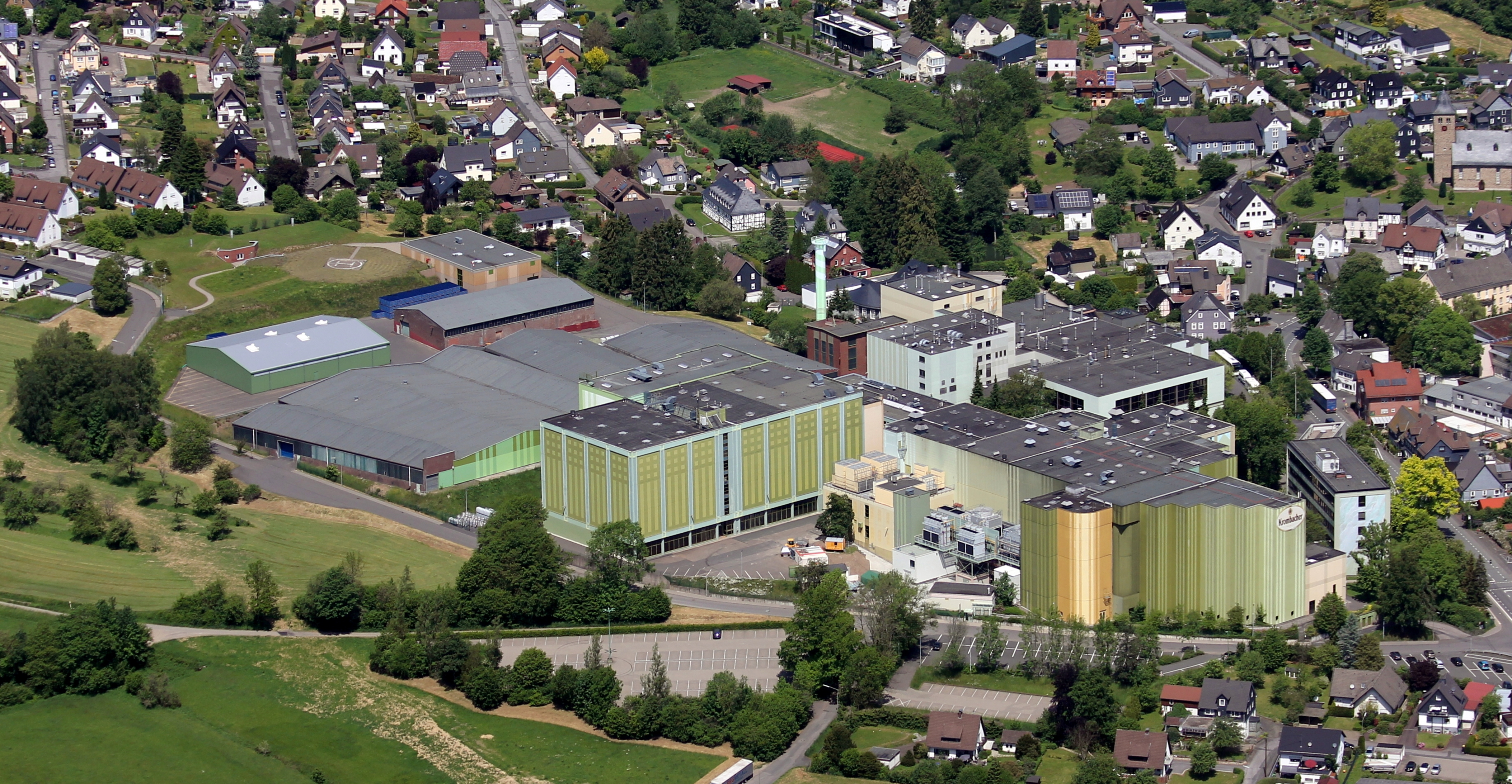 Krombacher Brauerei Kreuztal , Kreis Siegen-Wittgenstein , Nordrhein-Westfalen